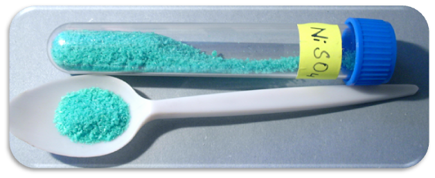 Síran nikelnatý - NiSO4